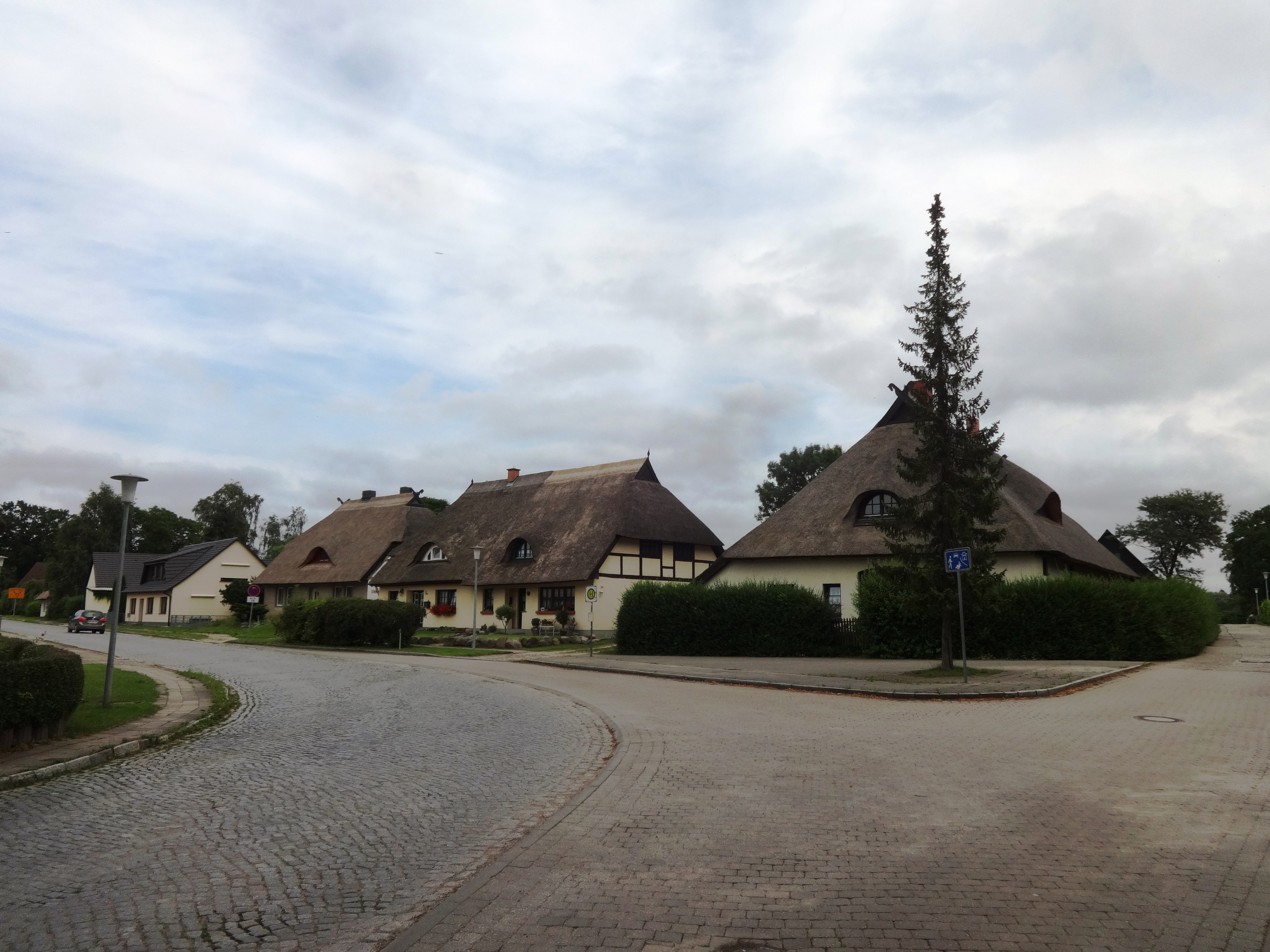 Kemnitz, eine Gemeinde im Landkreis Vorpommern-Greifswald in Mecklenburg-Vorpommern